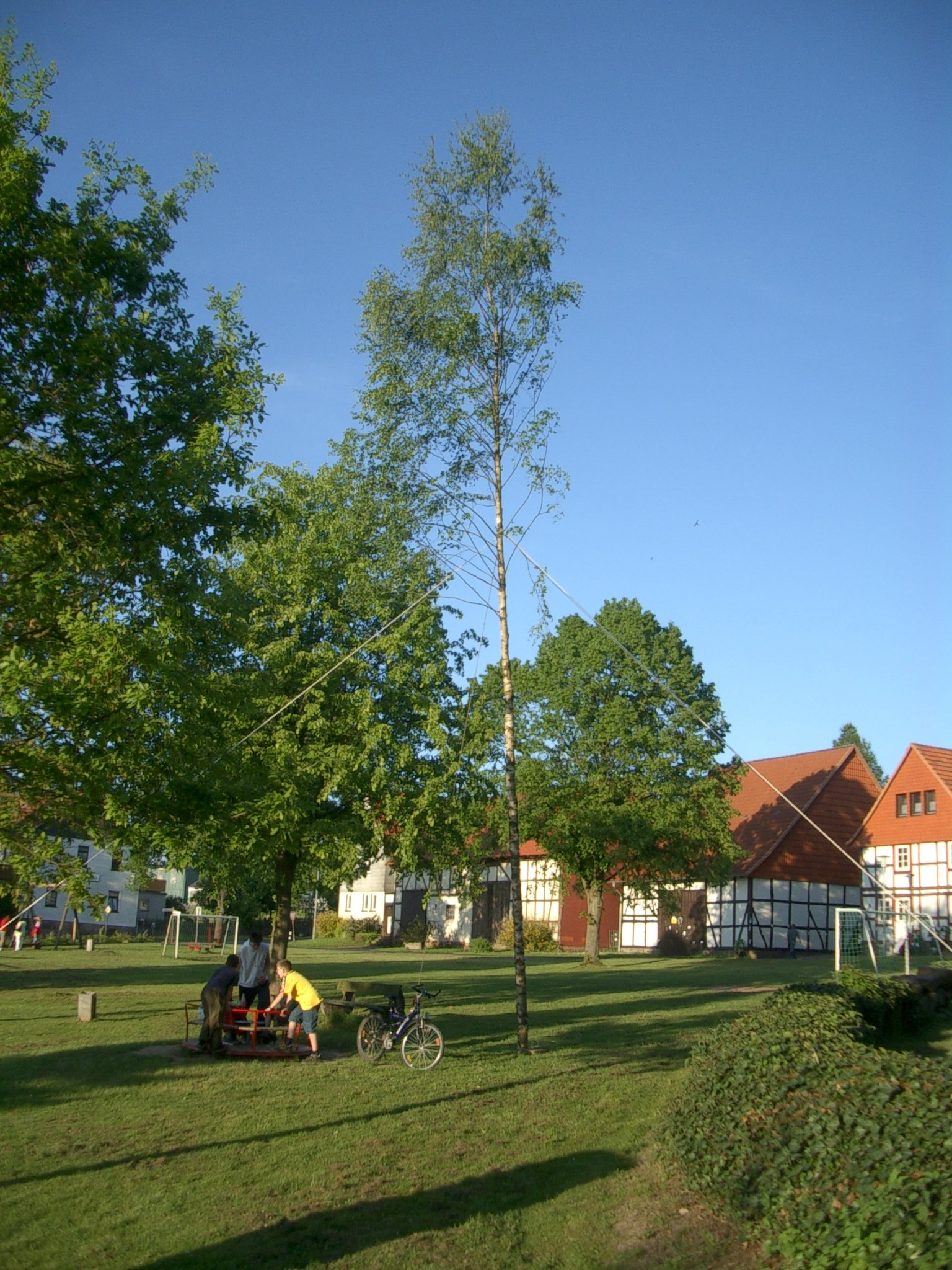 Anger Lichtenhagen